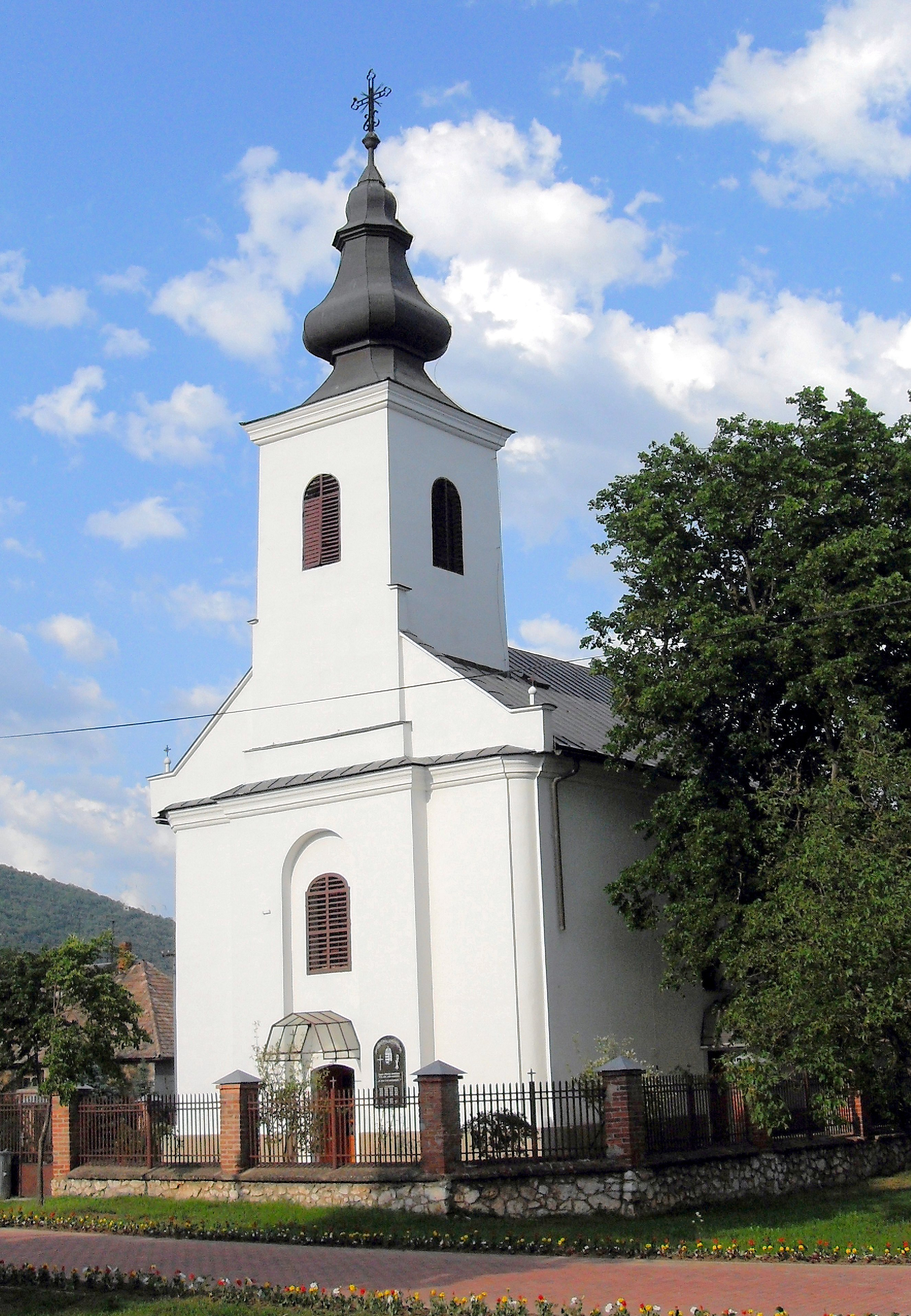 Farský kostol sv. kríža v Dvorníky